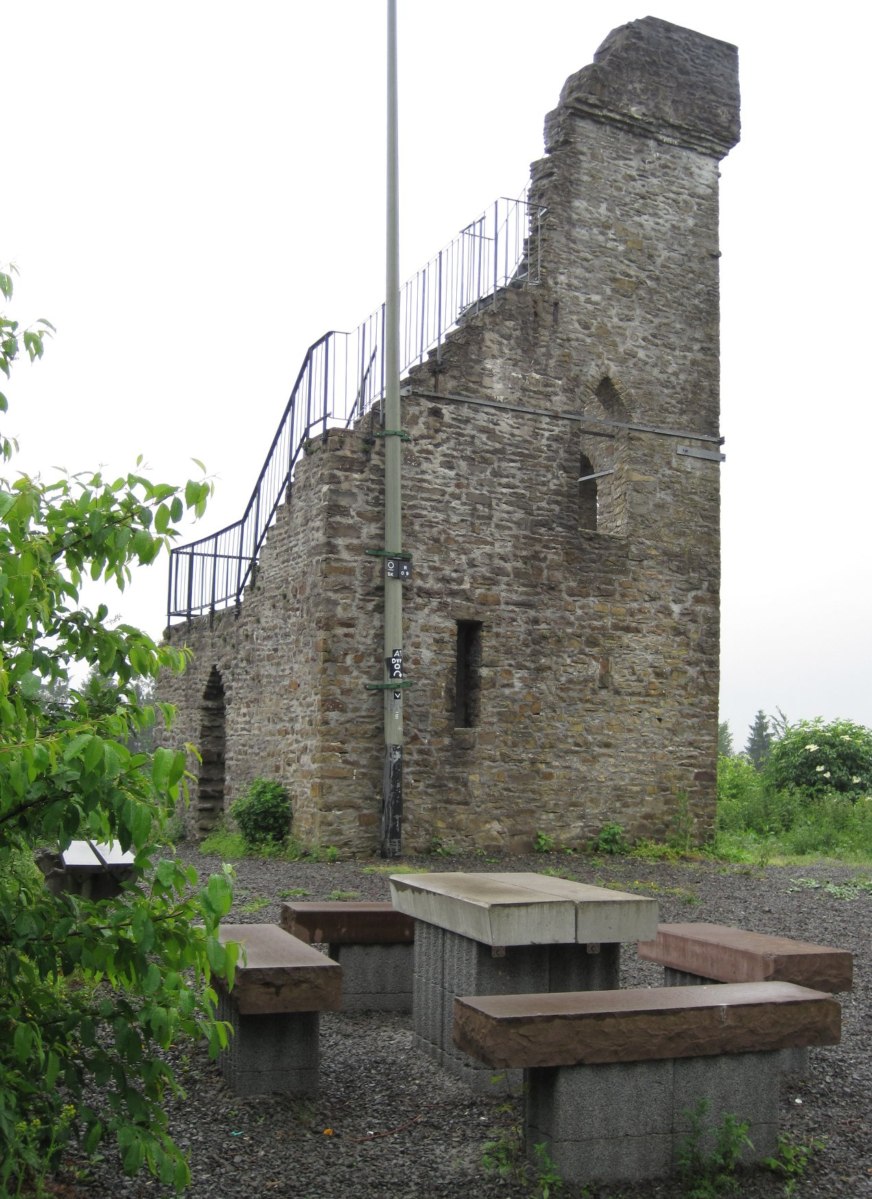 Aussichtsturm Meerhardtturm bei Dieringhausen, Nähe Engelskirchen